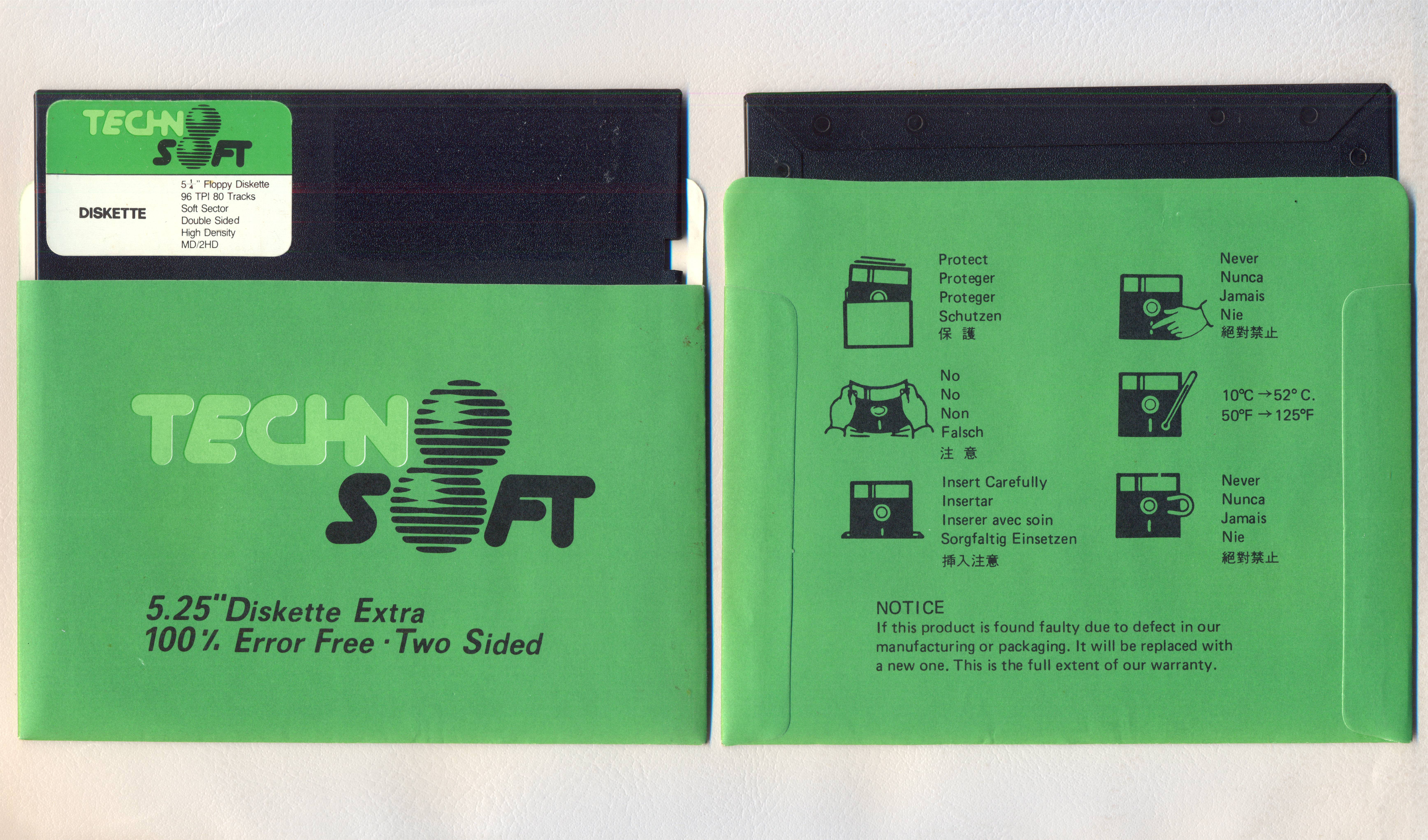 Расположение дискеты 5,25 дюйма в конверте (Вид с лицевой и оборотной сторон)